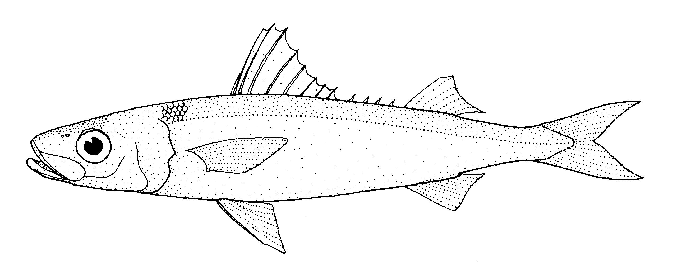 Emmelichthys nitidus nitidus (Redbait)